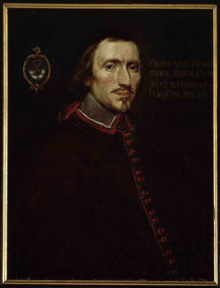 Sint-Baafskathedraal, Gent Portret van Mgr. Franc. Van Hoorenbeke; inv nr: 499/10